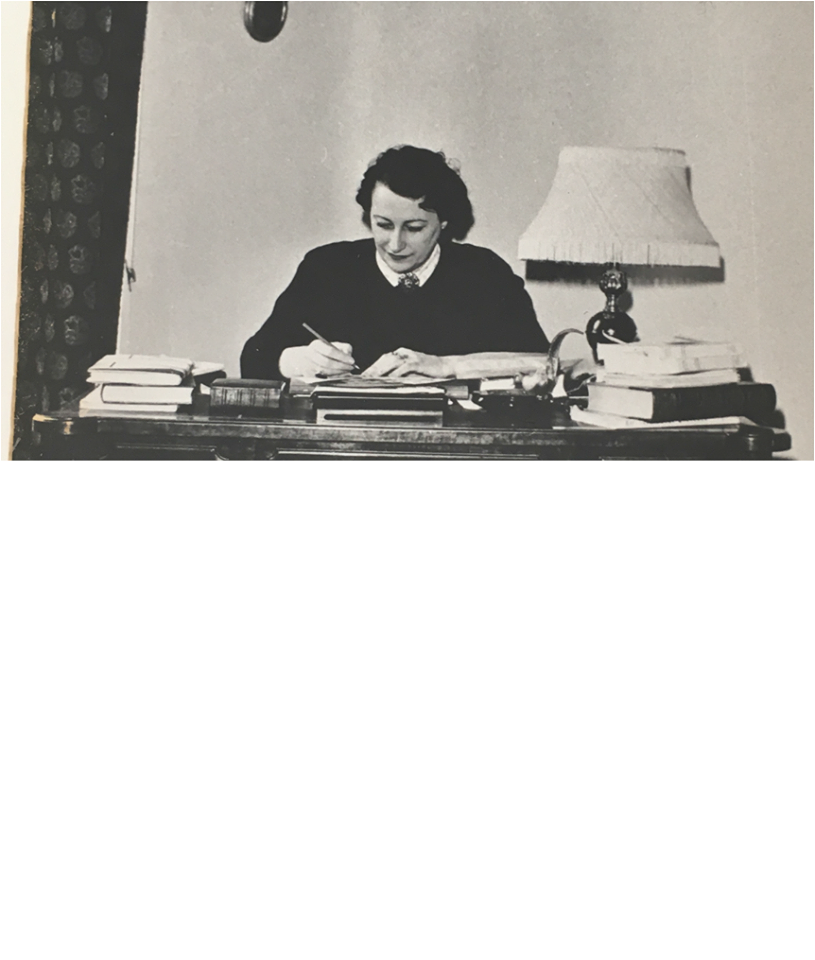 Foto de Carolina Zamora en su estudio